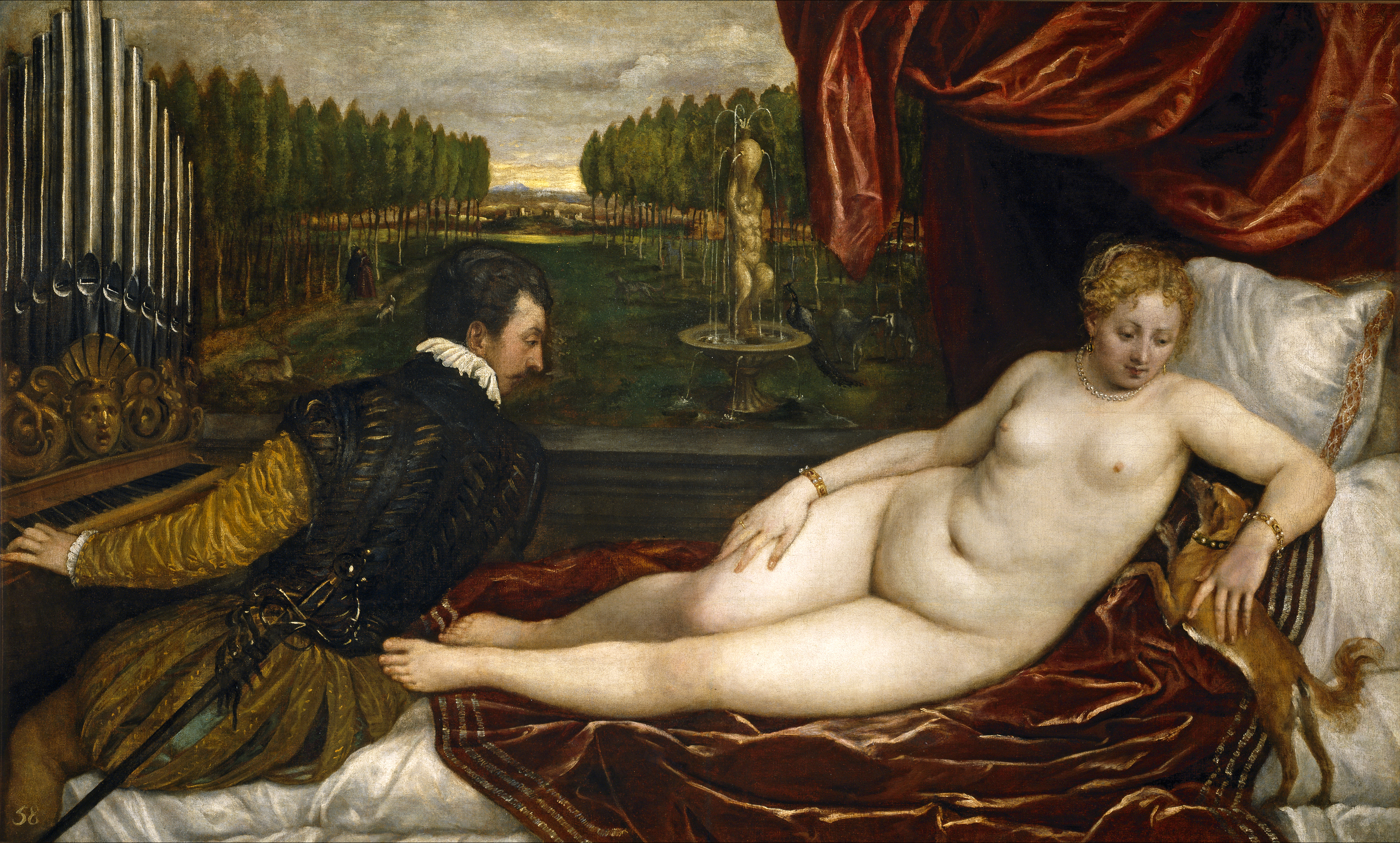 La obra representa a la diosa Venus recostada en un lecho y acariciando un perro al tiempo que escucha al caballero que toca el piano y que la observa.